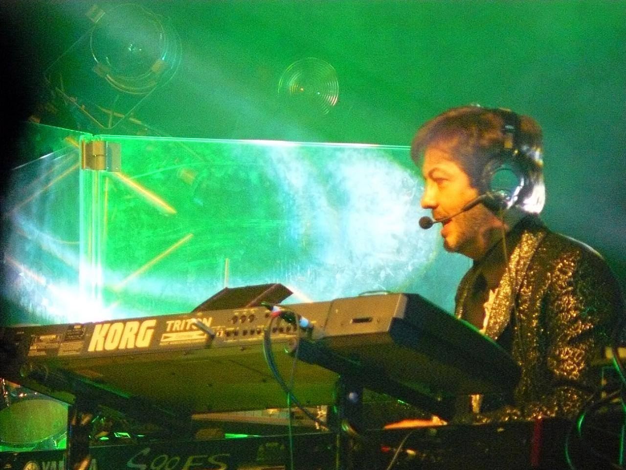 Rocco Tanica. Lumbaart: El Rocco Tanica.